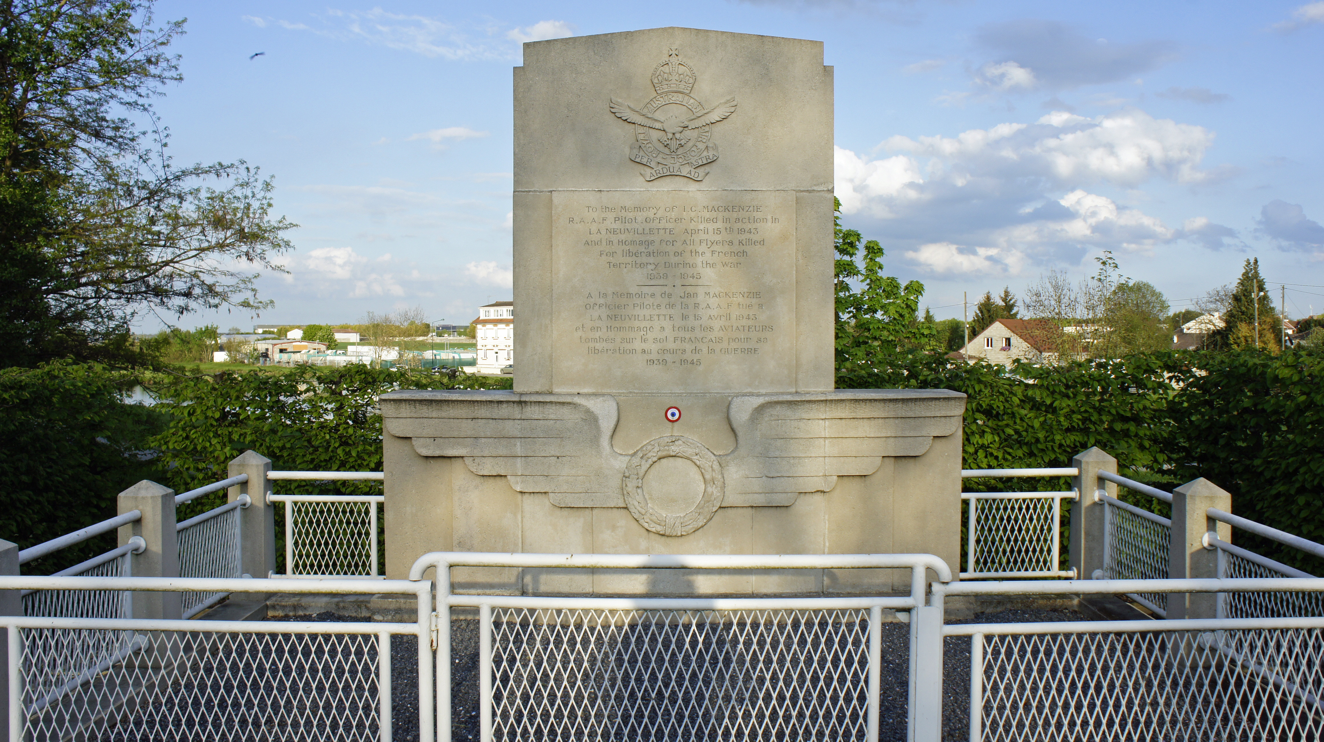 Monument en hommage à Jan Mackenzie et aux aviateurs tombés pendant de la Seconde guerre mondiale.